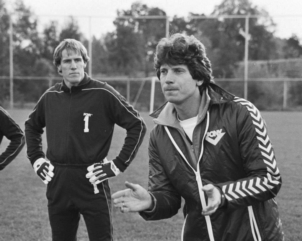 Training FC Utrecht voor wedstrijd woensdag tegen Eintracht Frankfurt, trainer Utrecht Han Berger met keeper Hans van Breukelen.